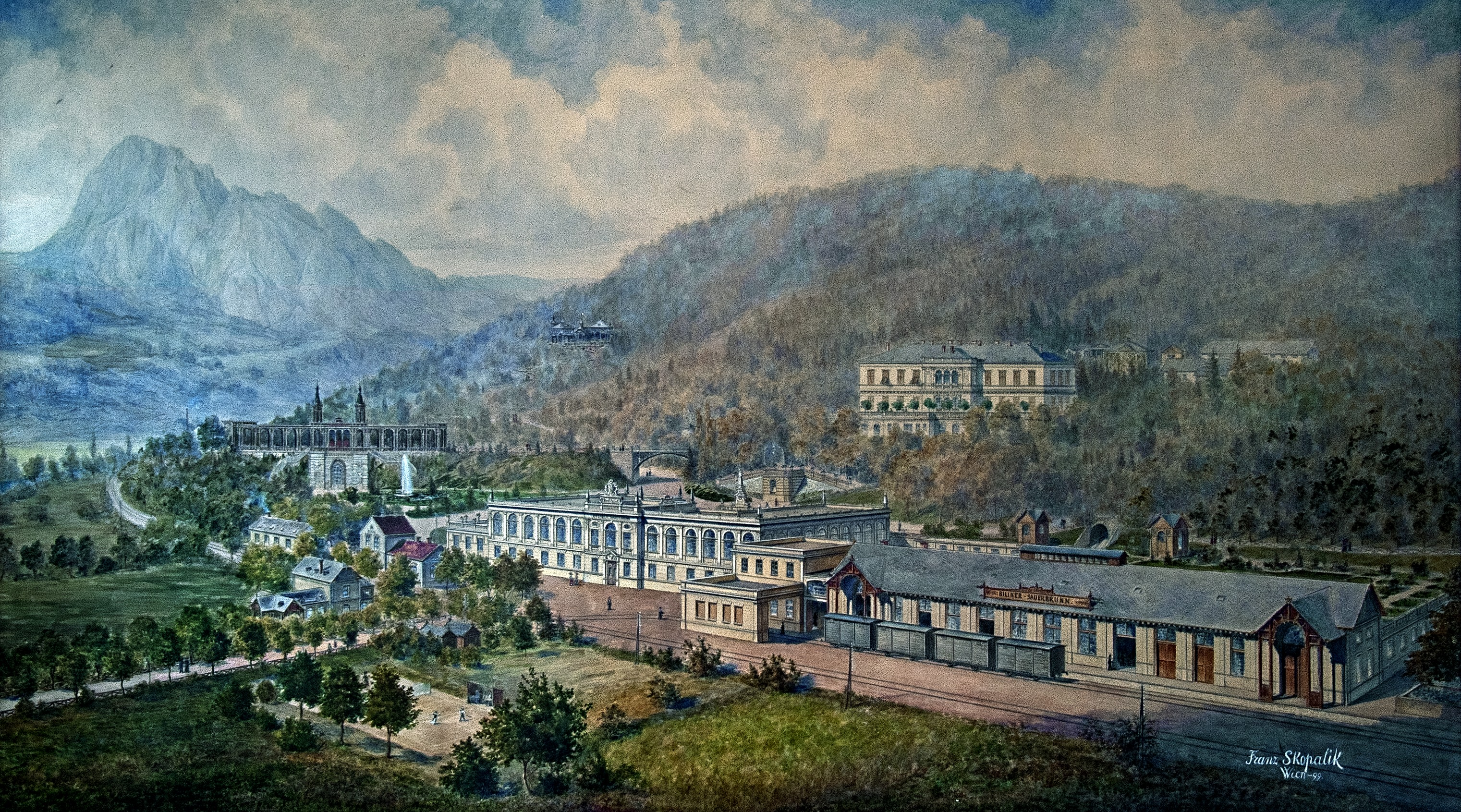 BILINER SAUERBRUNN 1899, obraz Franz Skopalik, Vídeň 1899